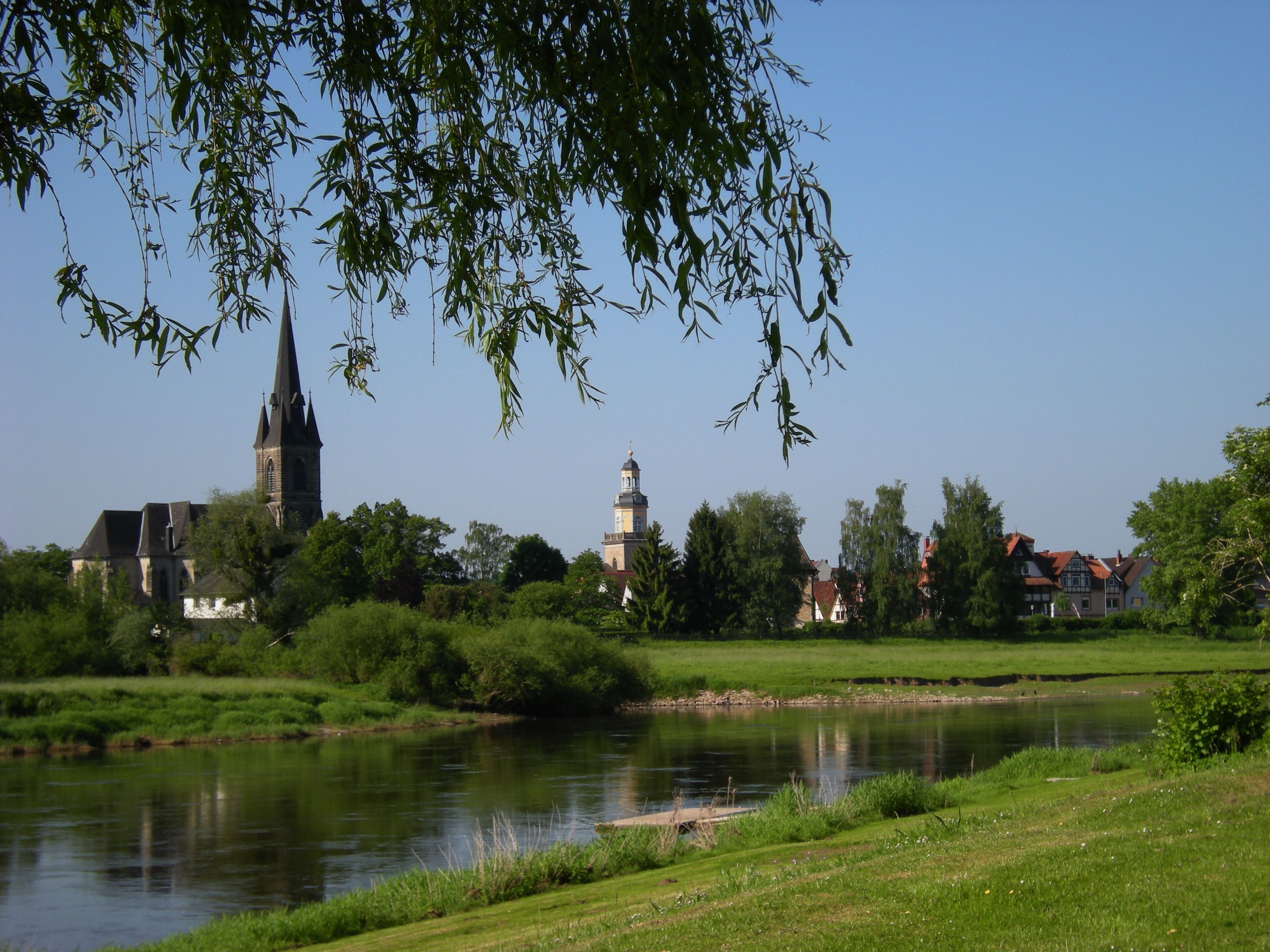 Rinteln-Stadt über die Weser, Kirchen St. Sturmius und St. Nikolai re..jpg